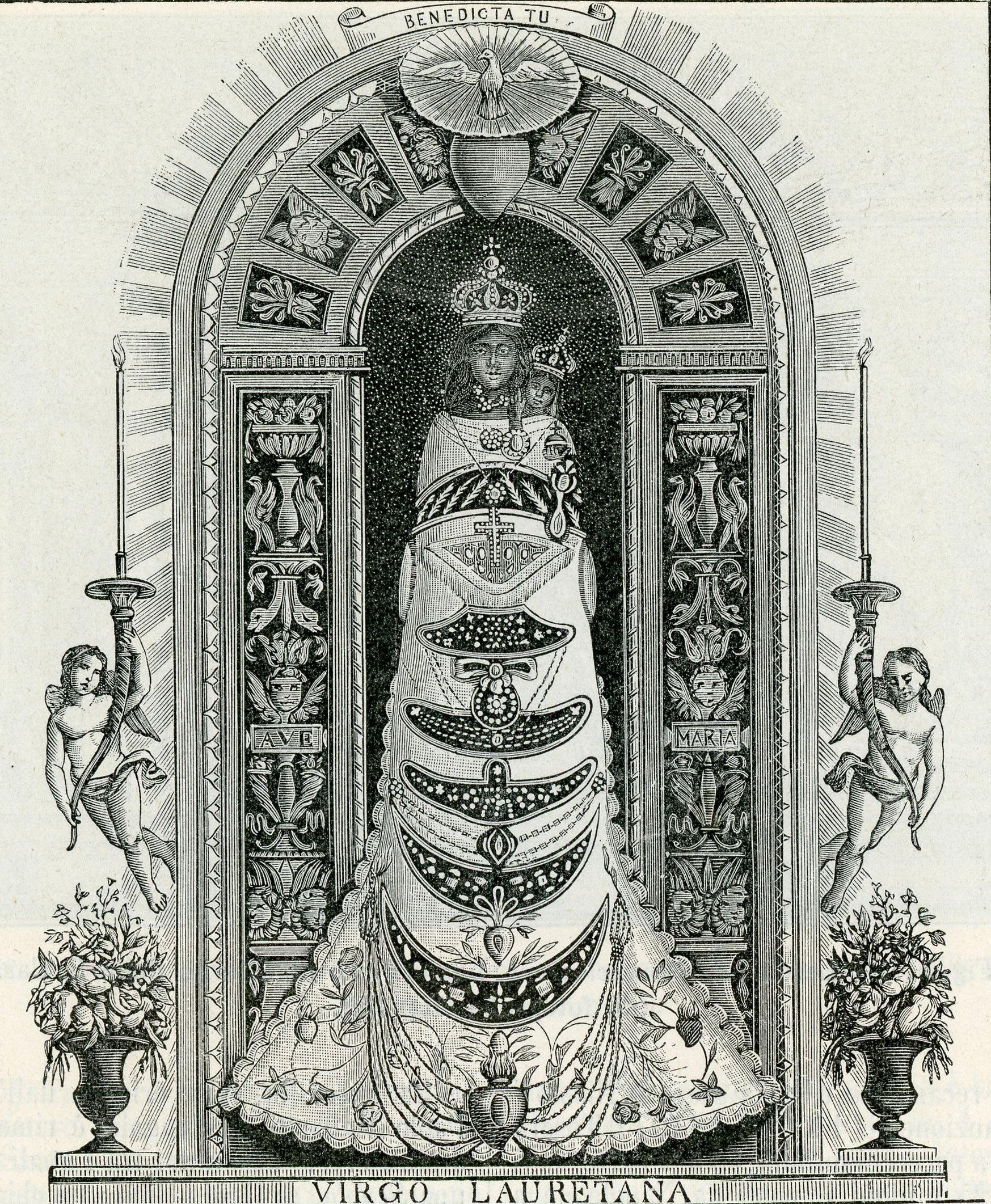 Loreto: Statua della Madonna nella S. Casa (xilografia).